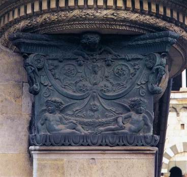 Capitello pulpito prato